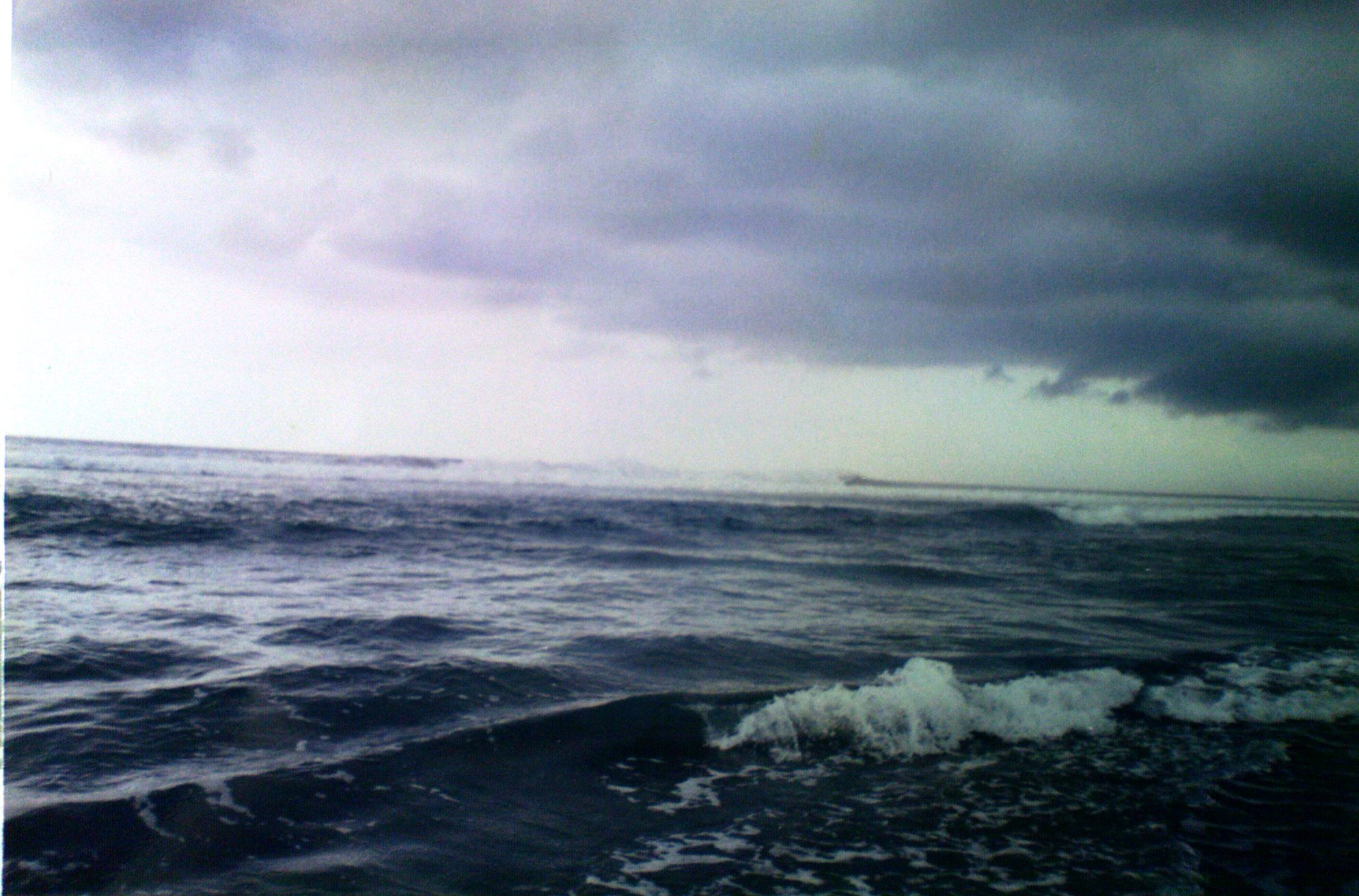 Playa.